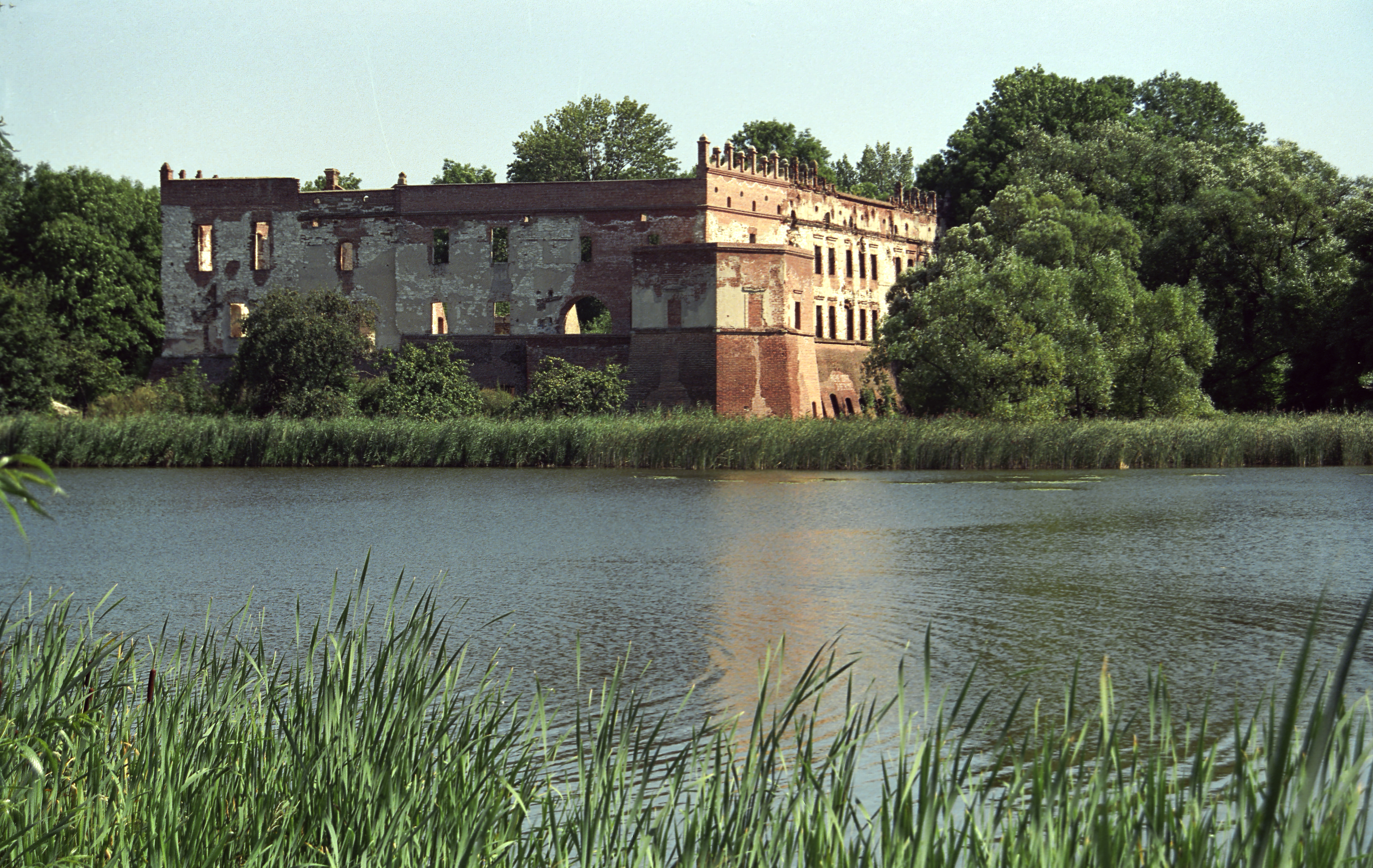 Poland, Krupe Castle